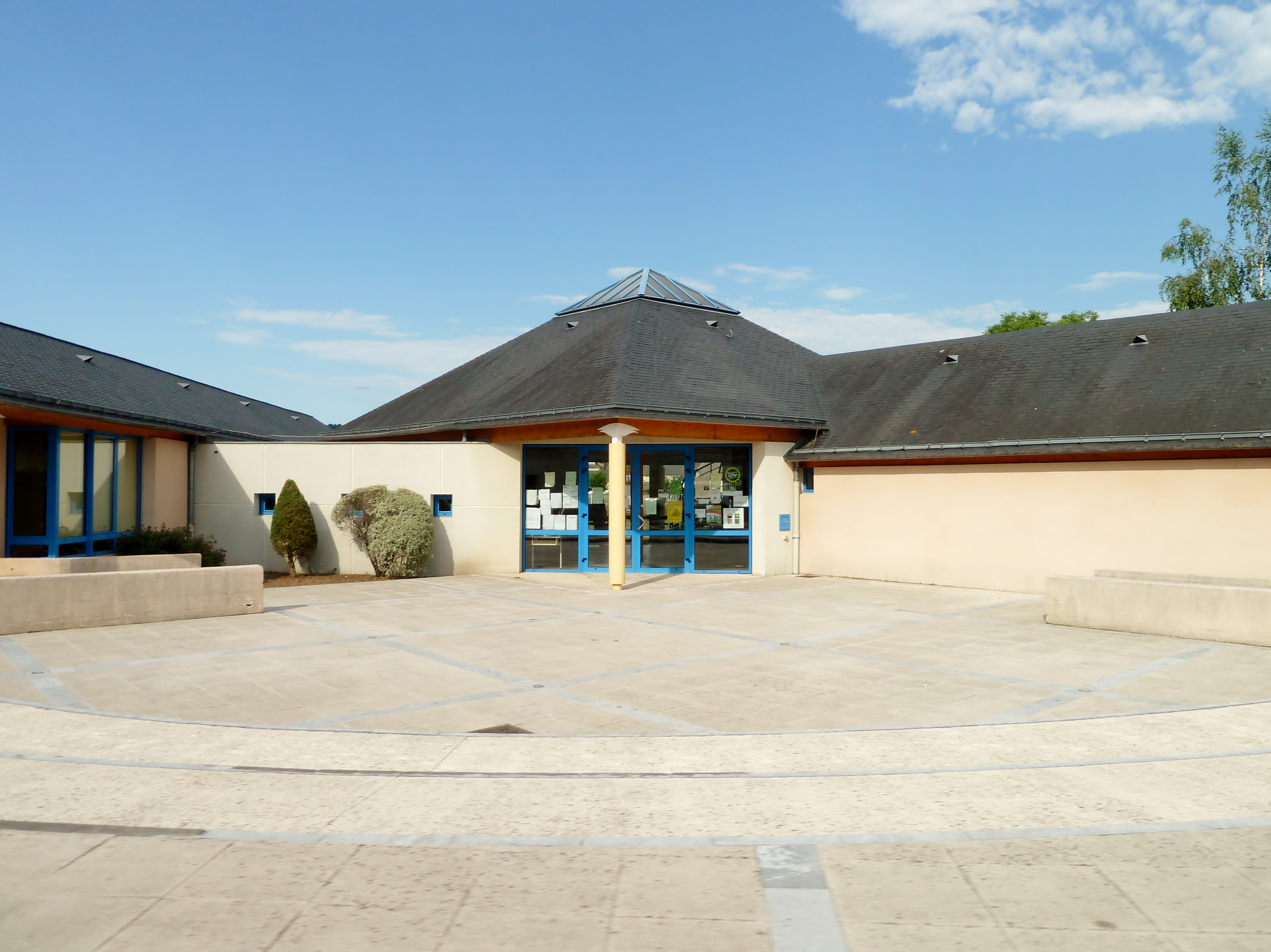 Mairie de Lagos (Pyrénées-Atlantiques)